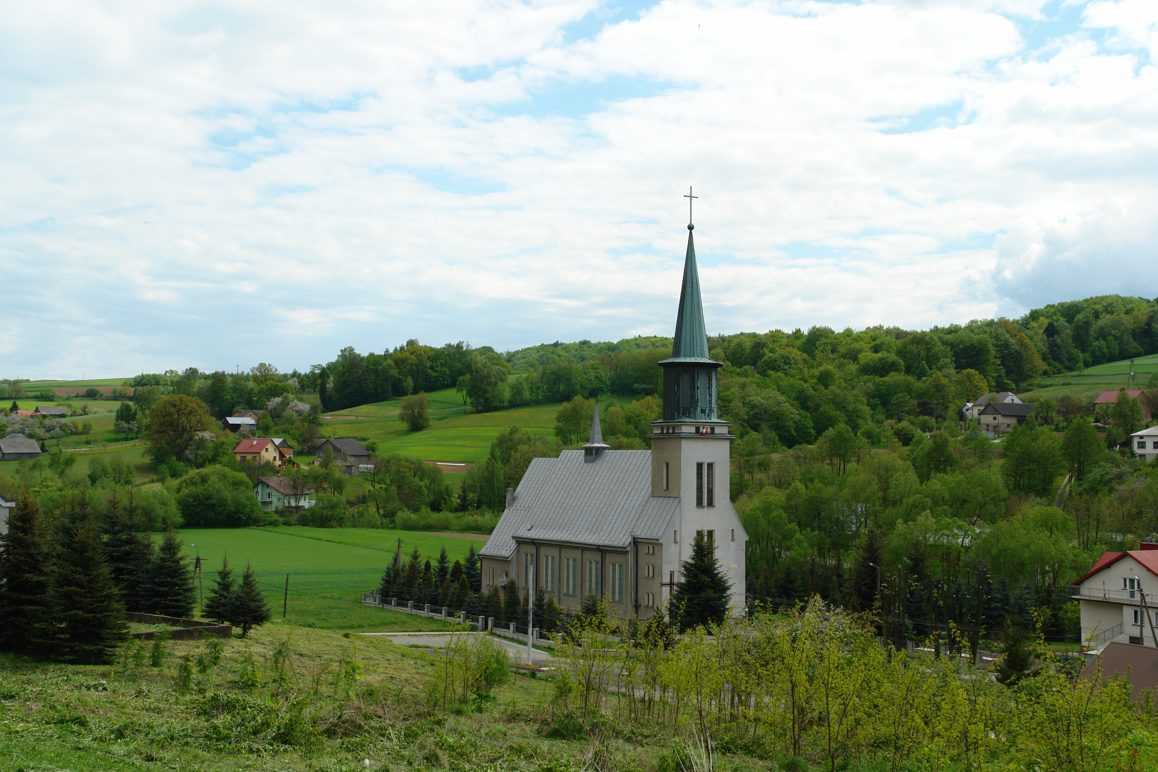 Kościół w Gumniskach